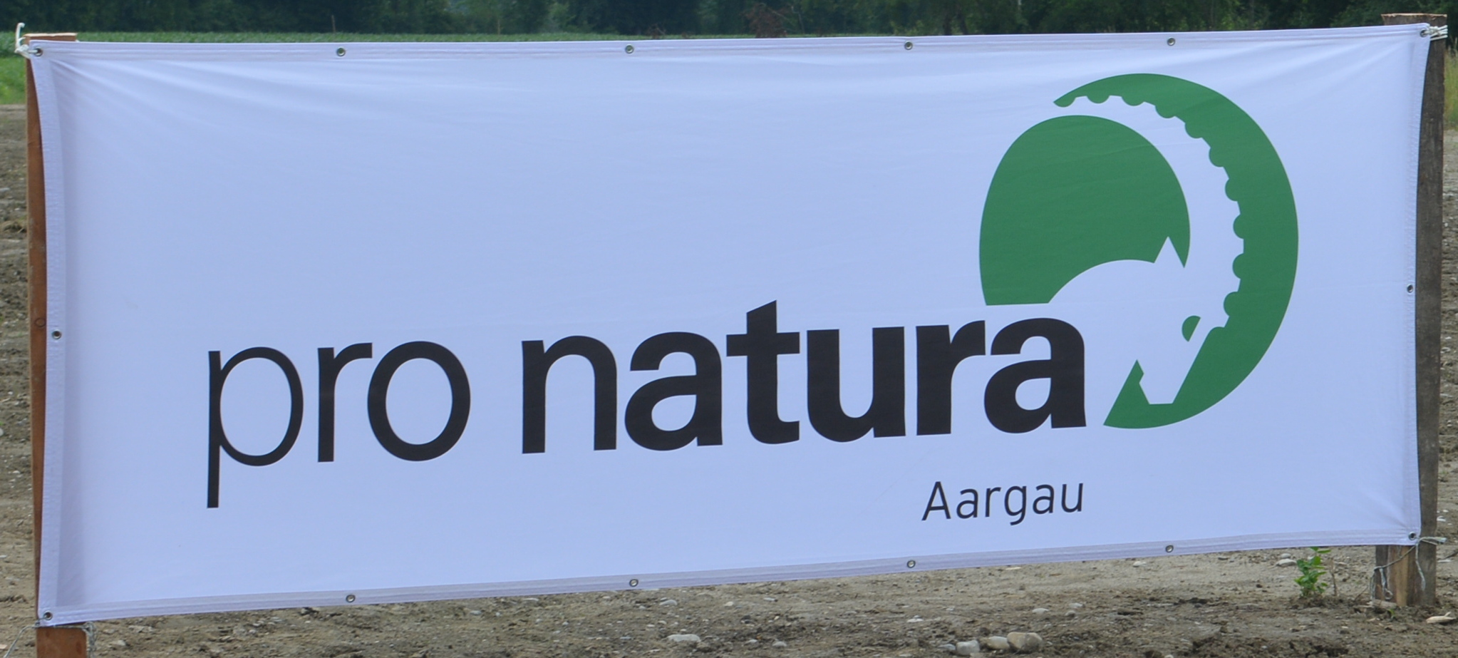 Ein Banner mit dem Logo der Pro Natura Aargau. Es wurde anlässlich der Einweihung des renaturierten Auen-Schutzgebiets Chly Rhy in Rietheim aufgestellt.